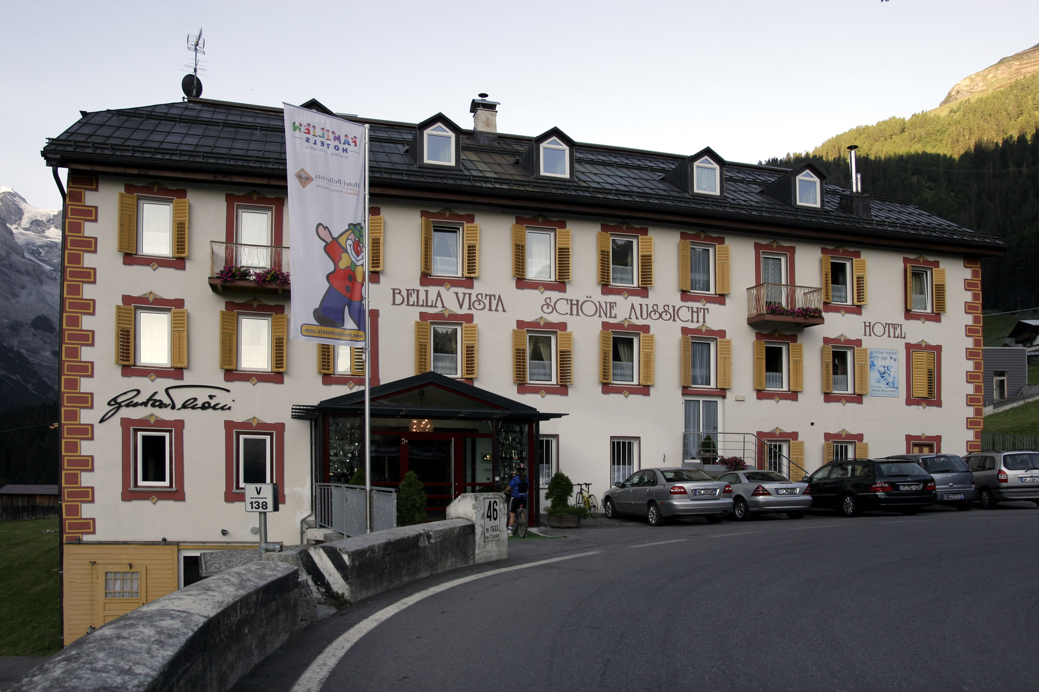 Das Geburtshaus von Gustav Thöni an der Straße zum Stilfser Joch in Trafoi